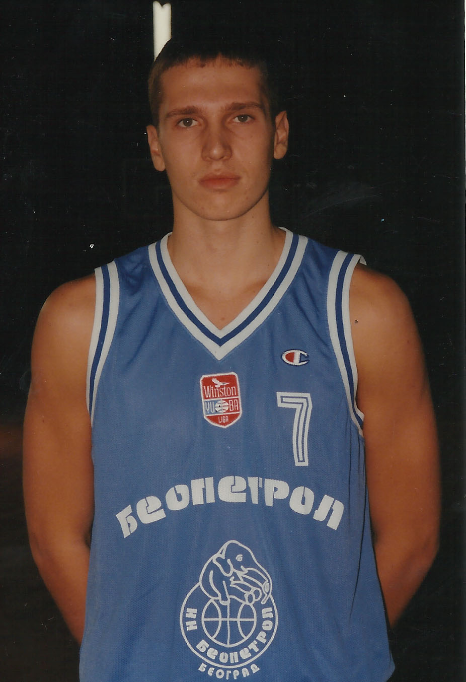 Košarkaš Dušan Kecman u Dresu Beopetrola 2000. godine